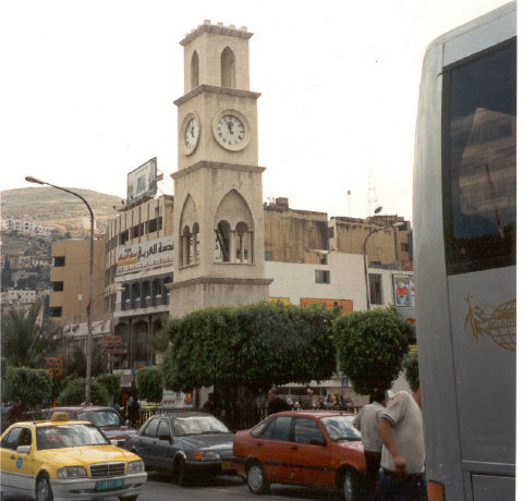 צולם ע"י הגב' אביבה רוסט